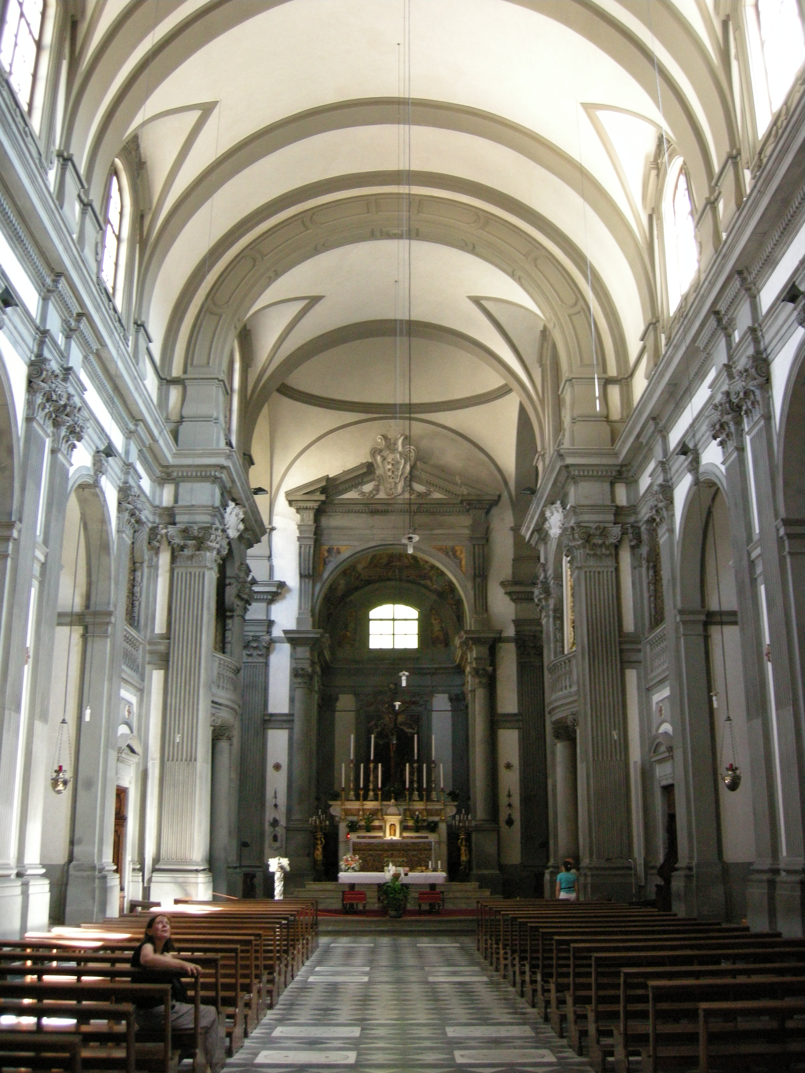 Santa felicita, interno